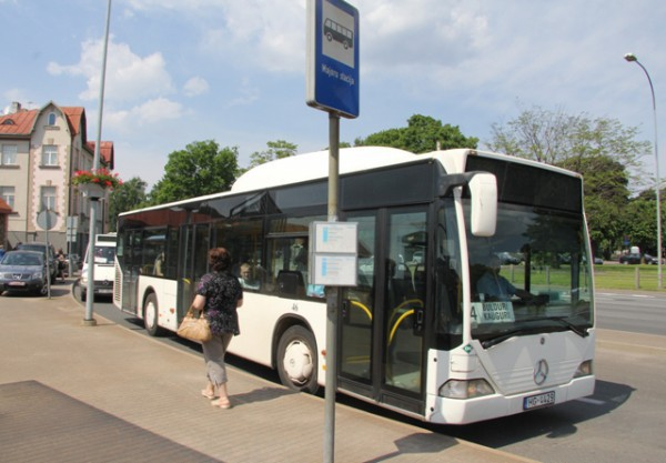 4. autobuss Majoros.